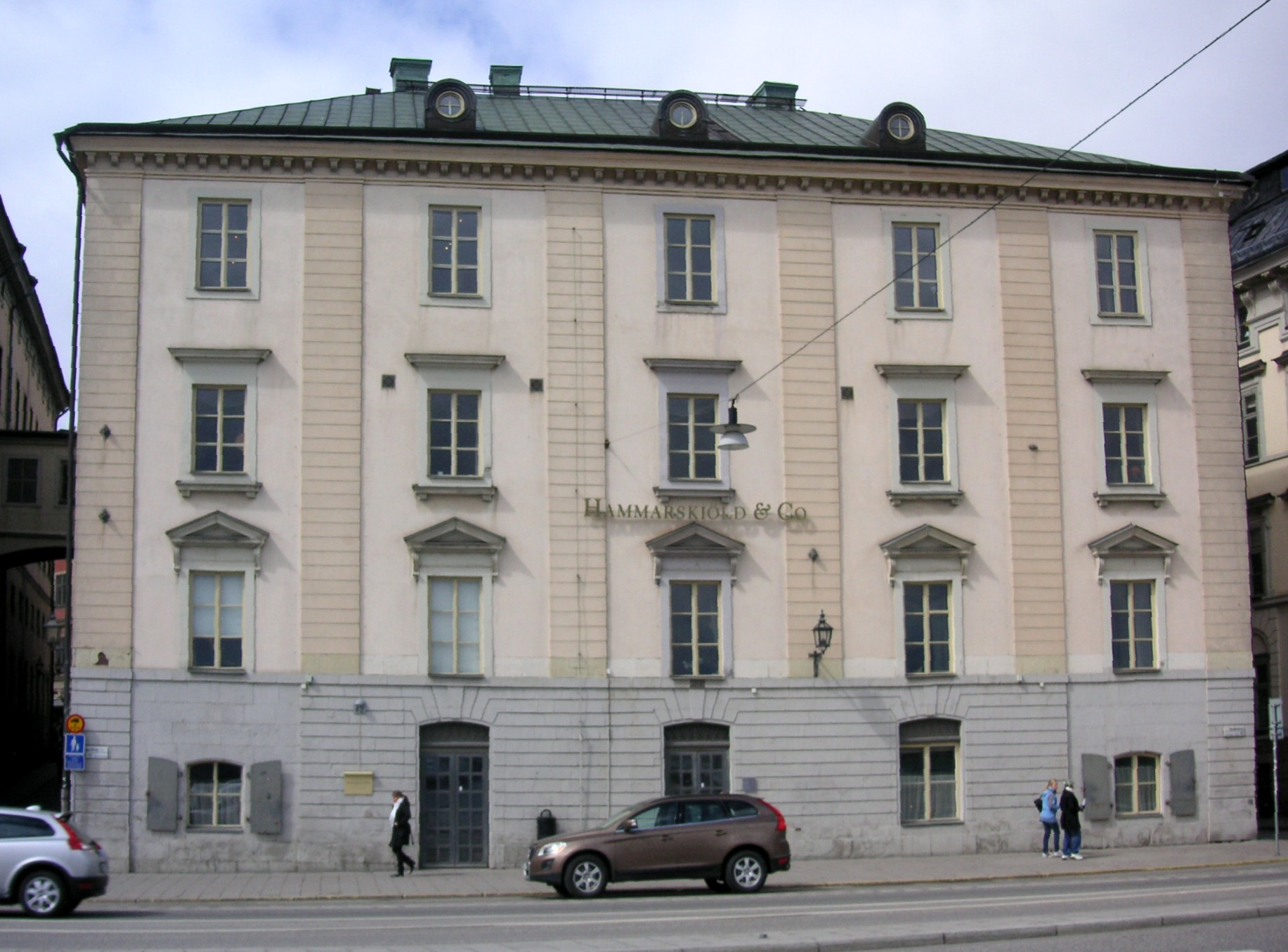 Byggnad "Skeppsbron nr 42A" i Stockholm